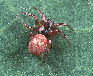 male Cyclosa sachikoae from Okinawa.